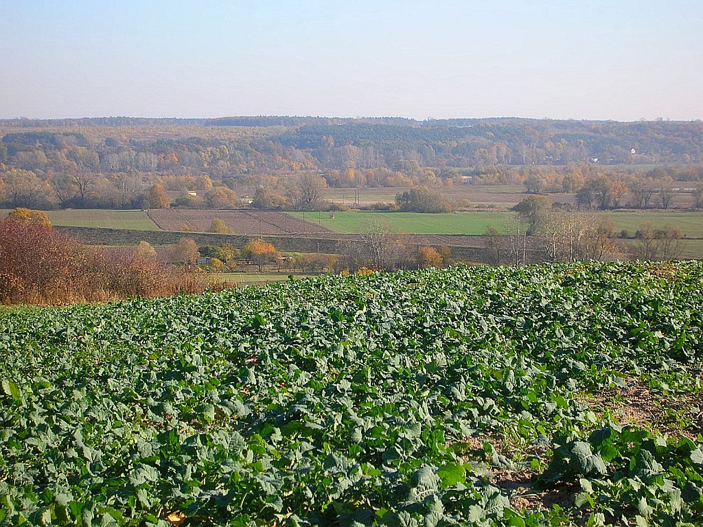 Fordoński przełom Wisły widziany z Jarużyna